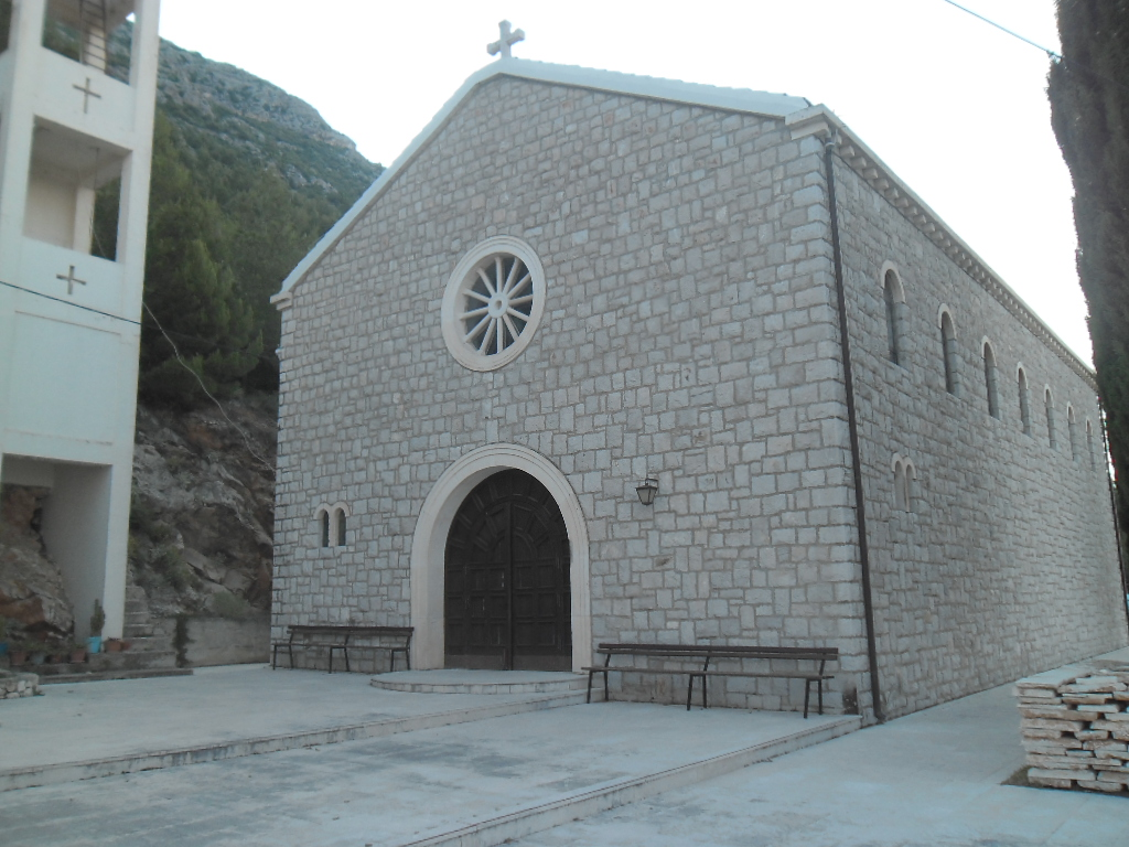 župna crkva u Babinom Polju, otok Mljet